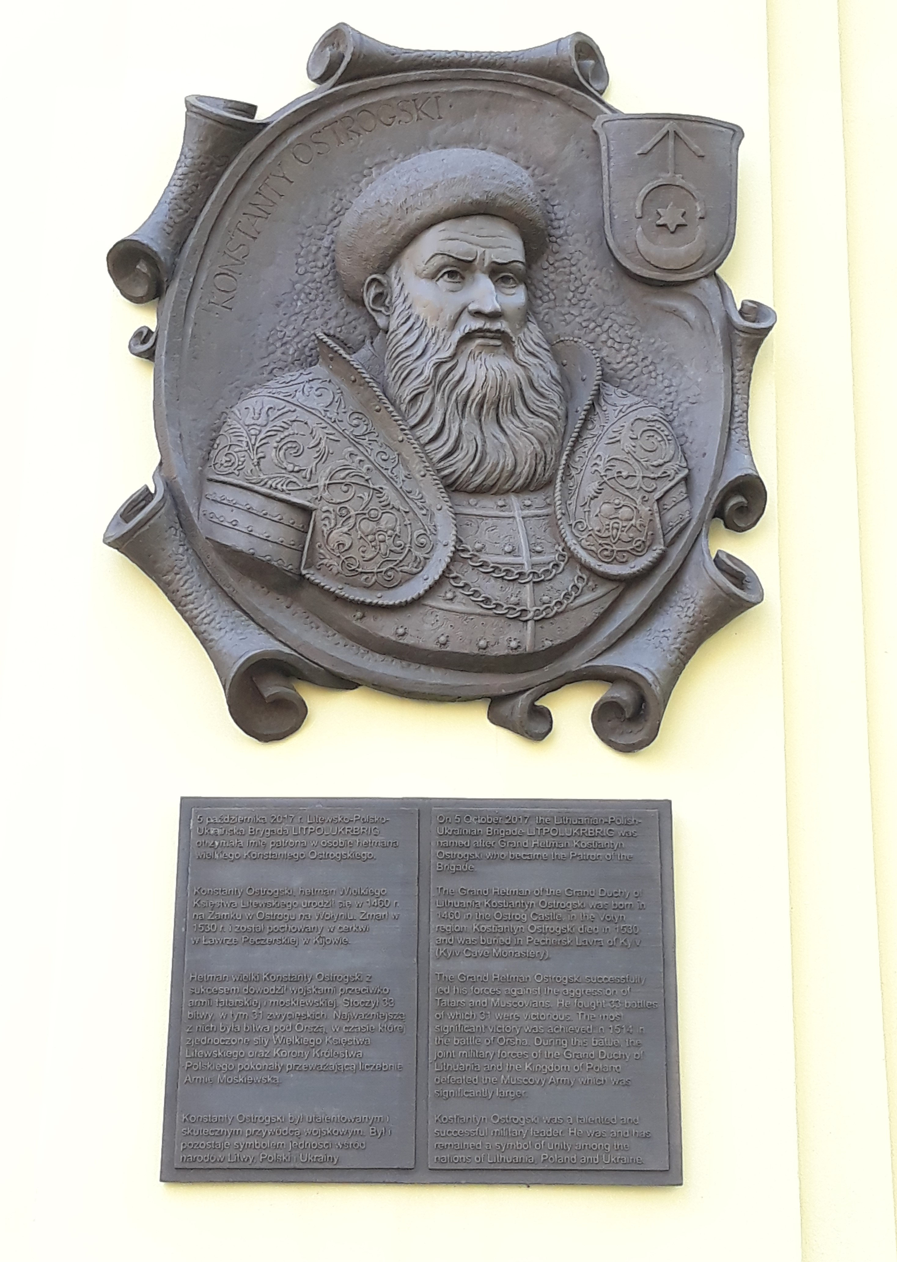 Меморіальна дошка князю Костянтину Острозькому у м. Люблін. Автори: Б. Крилов, О. Сидорук